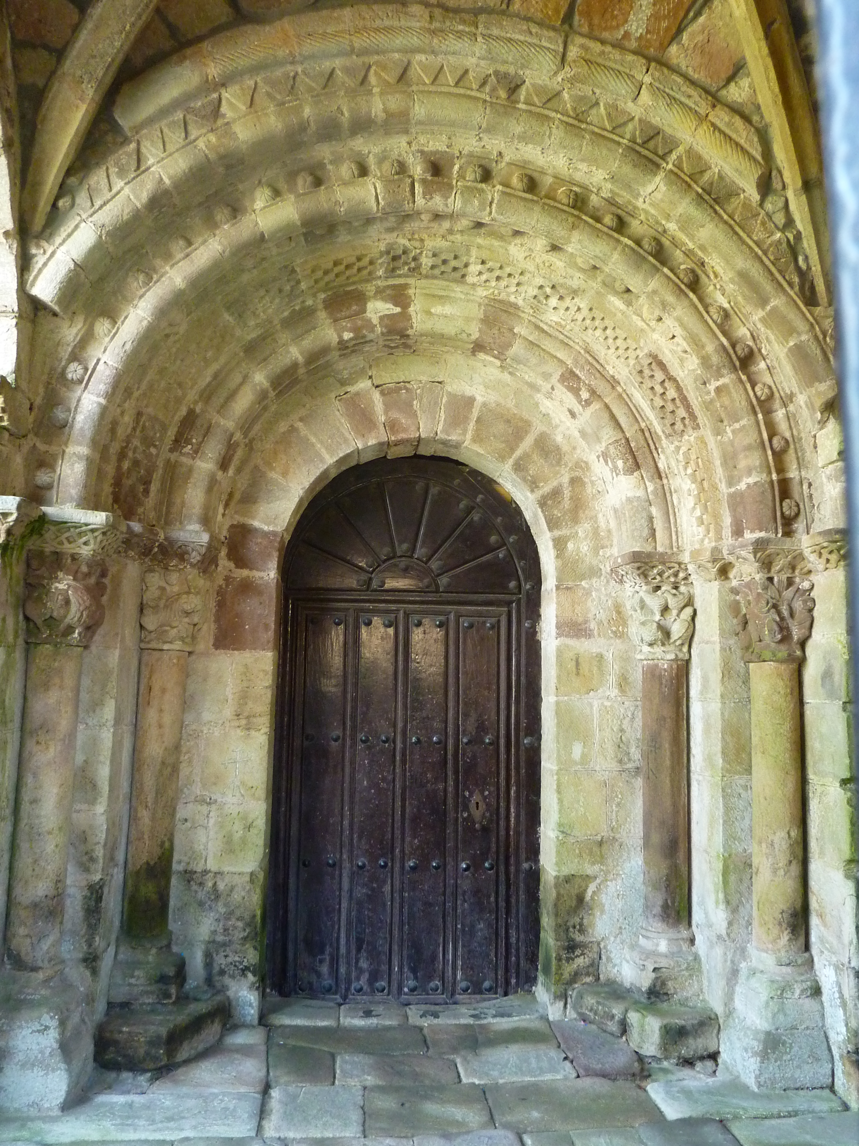 Iglesia de San Andres Argomilla. Santa Maria De Cayon